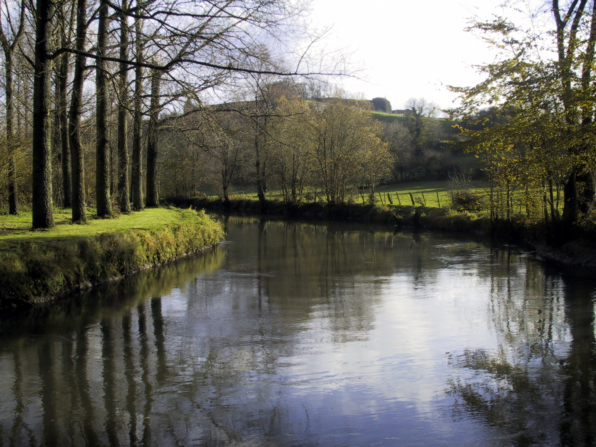 photo personnelle domaine public